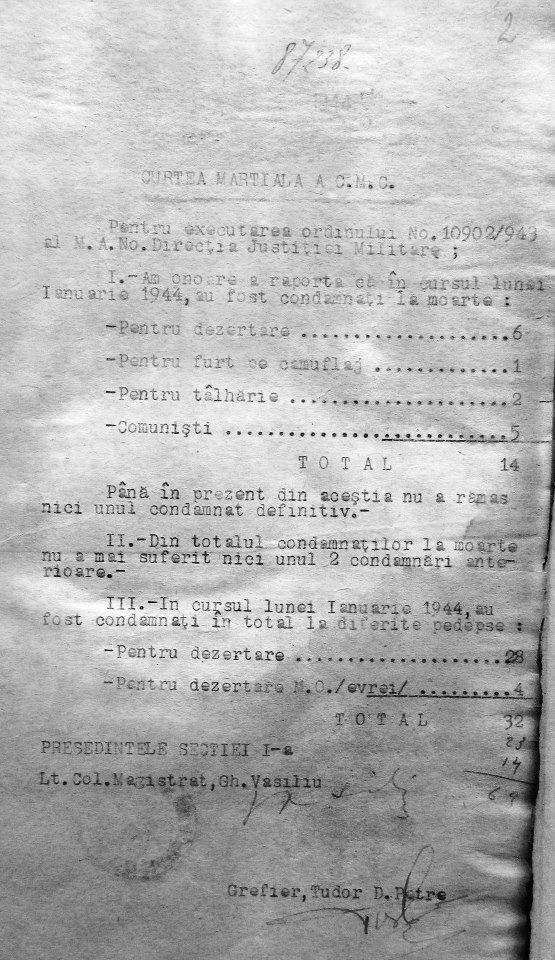 Raport Curtea Marțială Ianuarie 1944